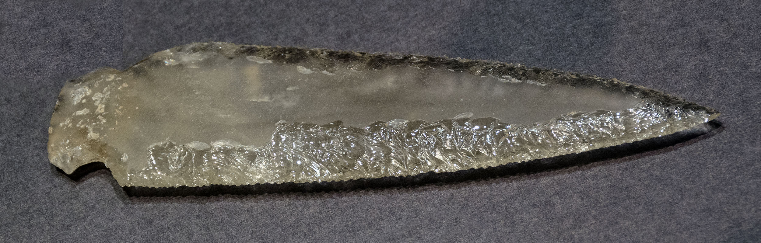 Está tallada en cristal de roca y procede del asentamiento de la Edad del Cobre de Montelirio d eb Valencina de la Concepción, Sevilla. Dada la escasez de este material en la Península Ibérica, se le supone importado. Se ha datado entre el 3.000 al 2.500 a.C.